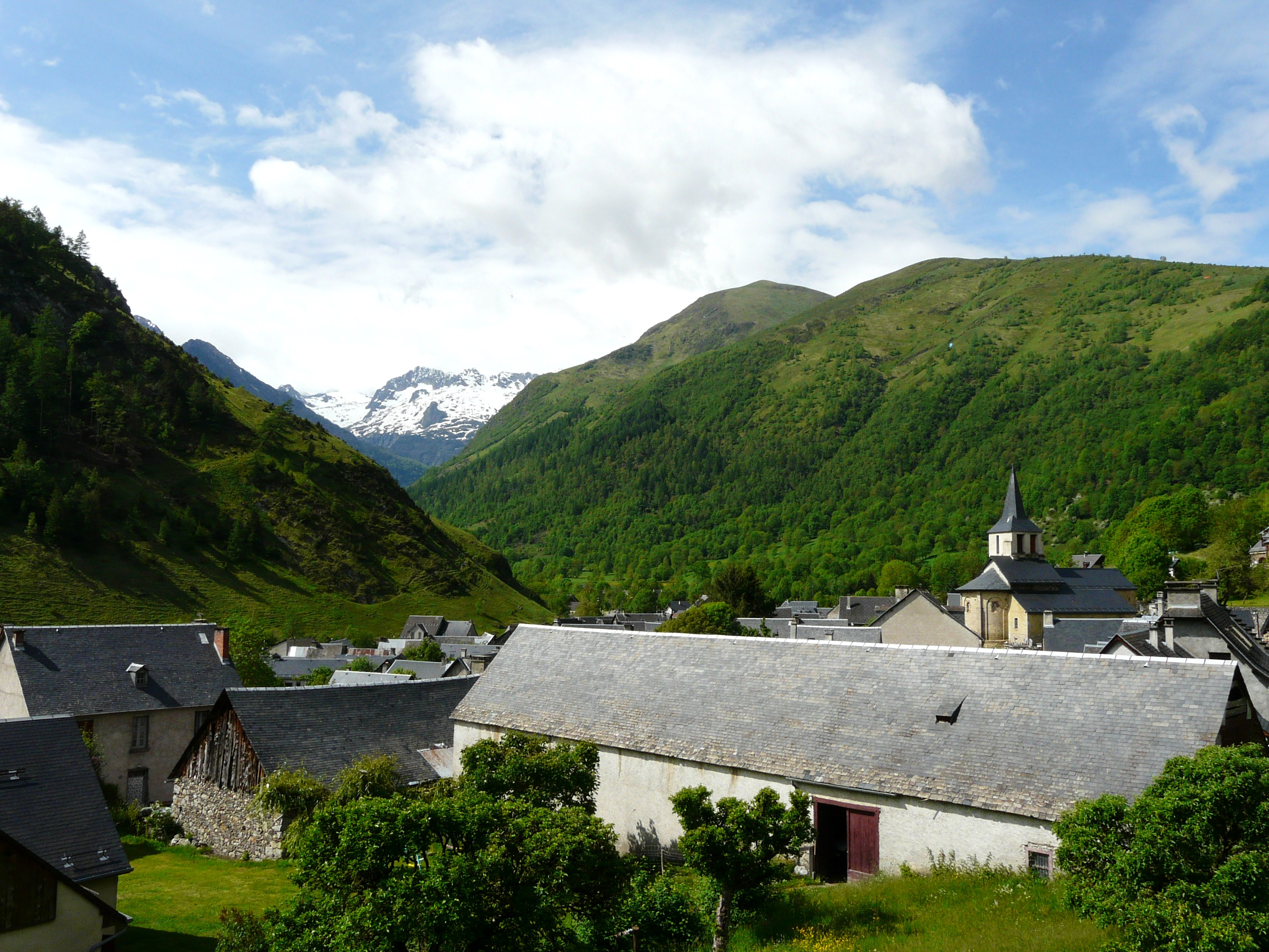 Le village d'Oô, Haute-Garonne, France.